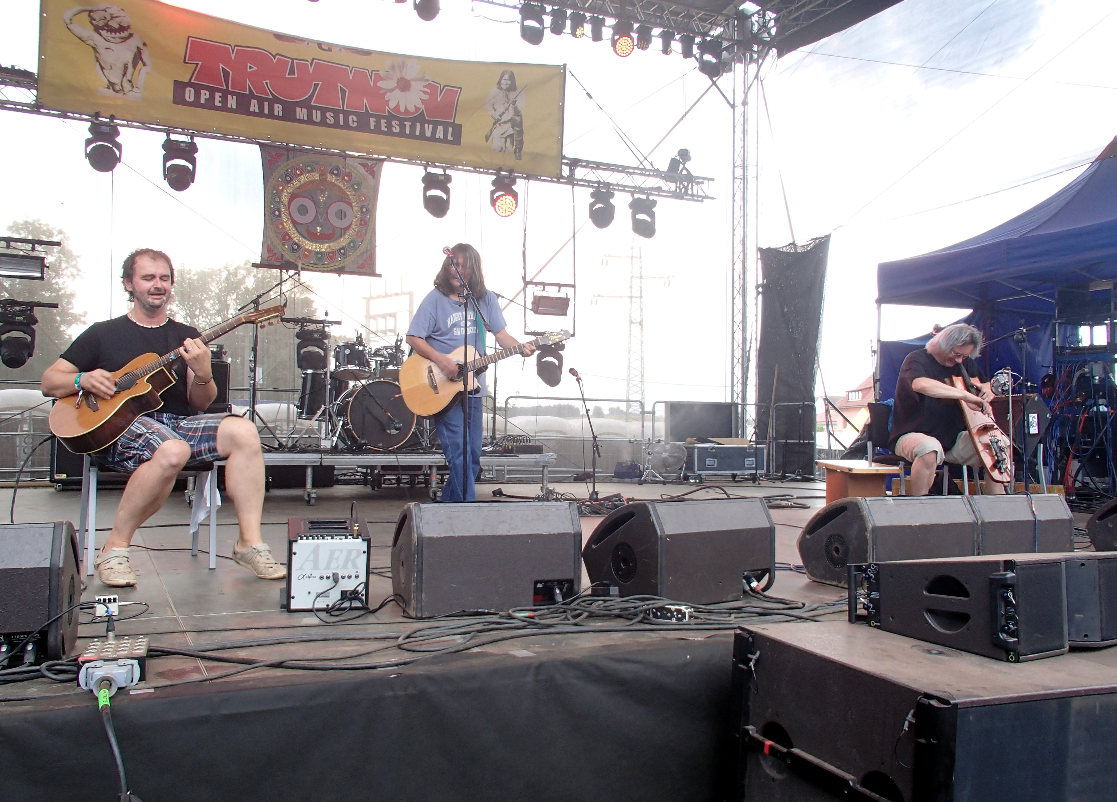 Ivan Hlas Trio na trutnovském festivalu 2013